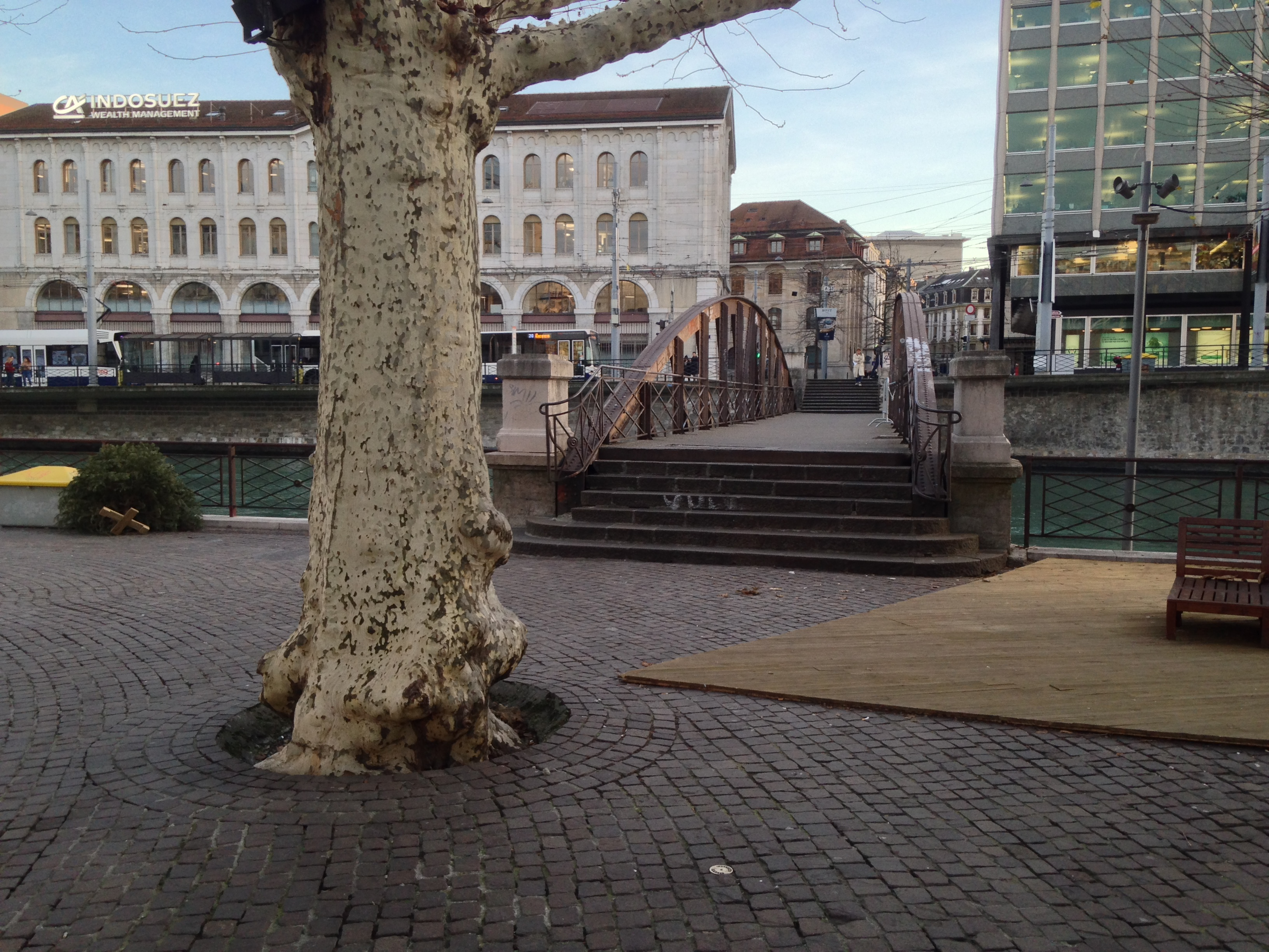 Passerelle de l'Île